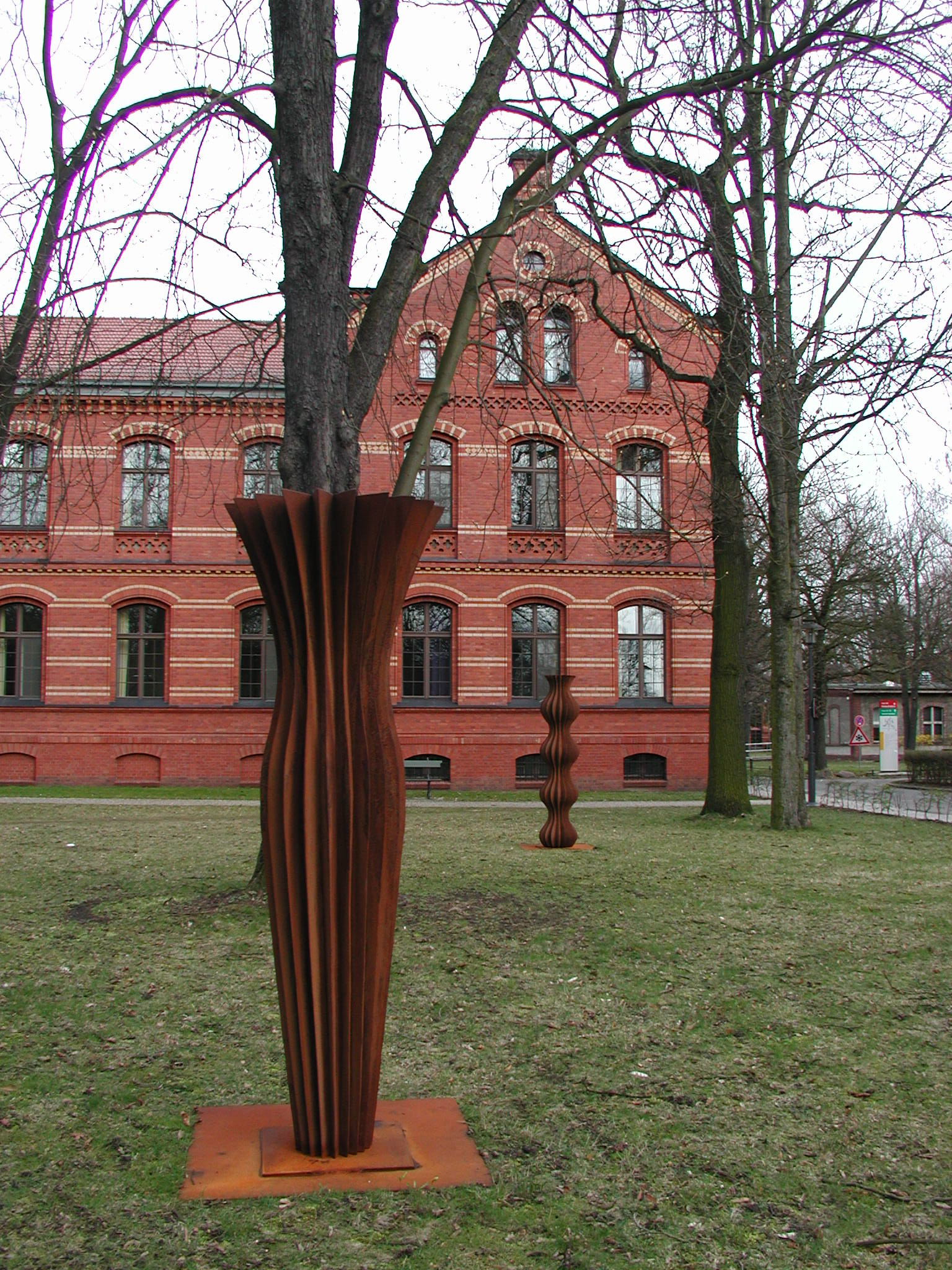 Metallkunst im KEH (1)